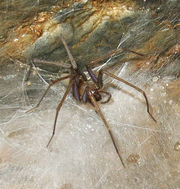 A female Tegenaria zamanii Marusik & Omelko, 2014, in Shirabad Cave, Golestan, Iran